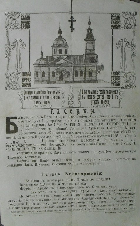 Пригласительный билет на освящение Церкви во имя Успения Пресвятой Богородицы (с. Куренёвка Каменец-Подольской губернии)